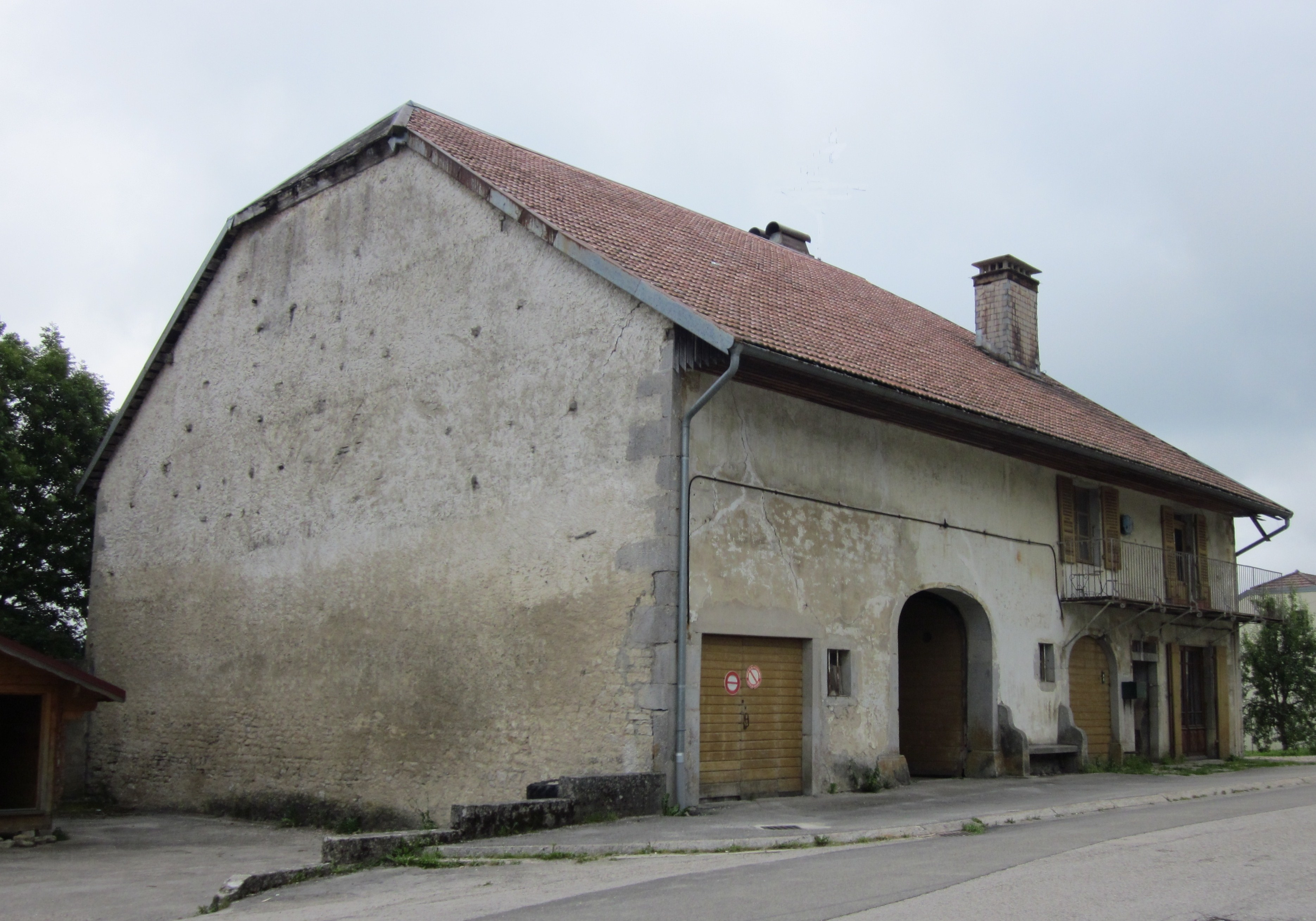 La Chaux-du-Dombief (Jura - France) - vieille ferme jurassienne